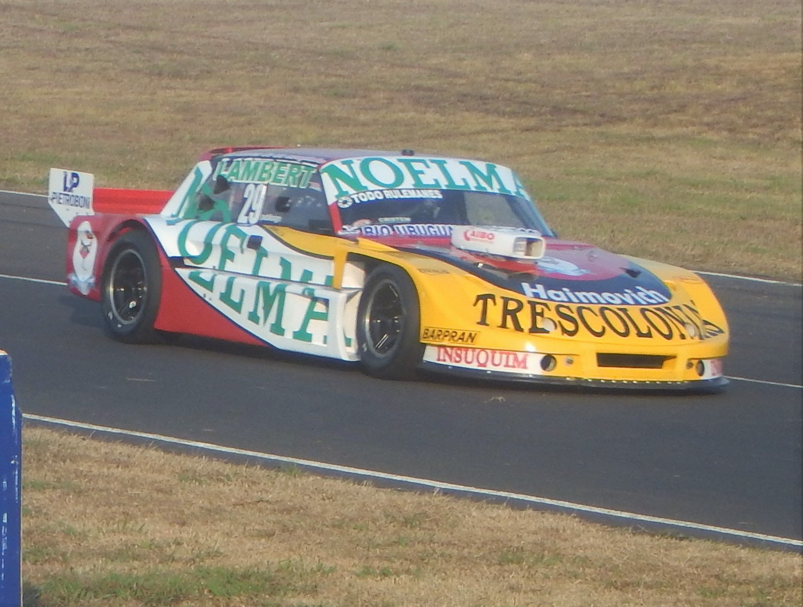 Nicolás Bonelli Paraná 2015